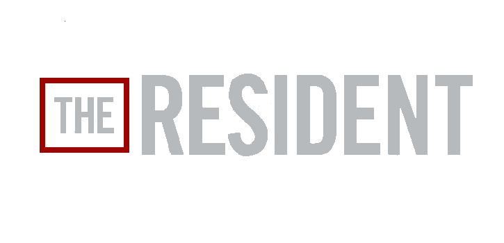 Logo utilizado de la intro de la temporada 2 de la serie The Resident